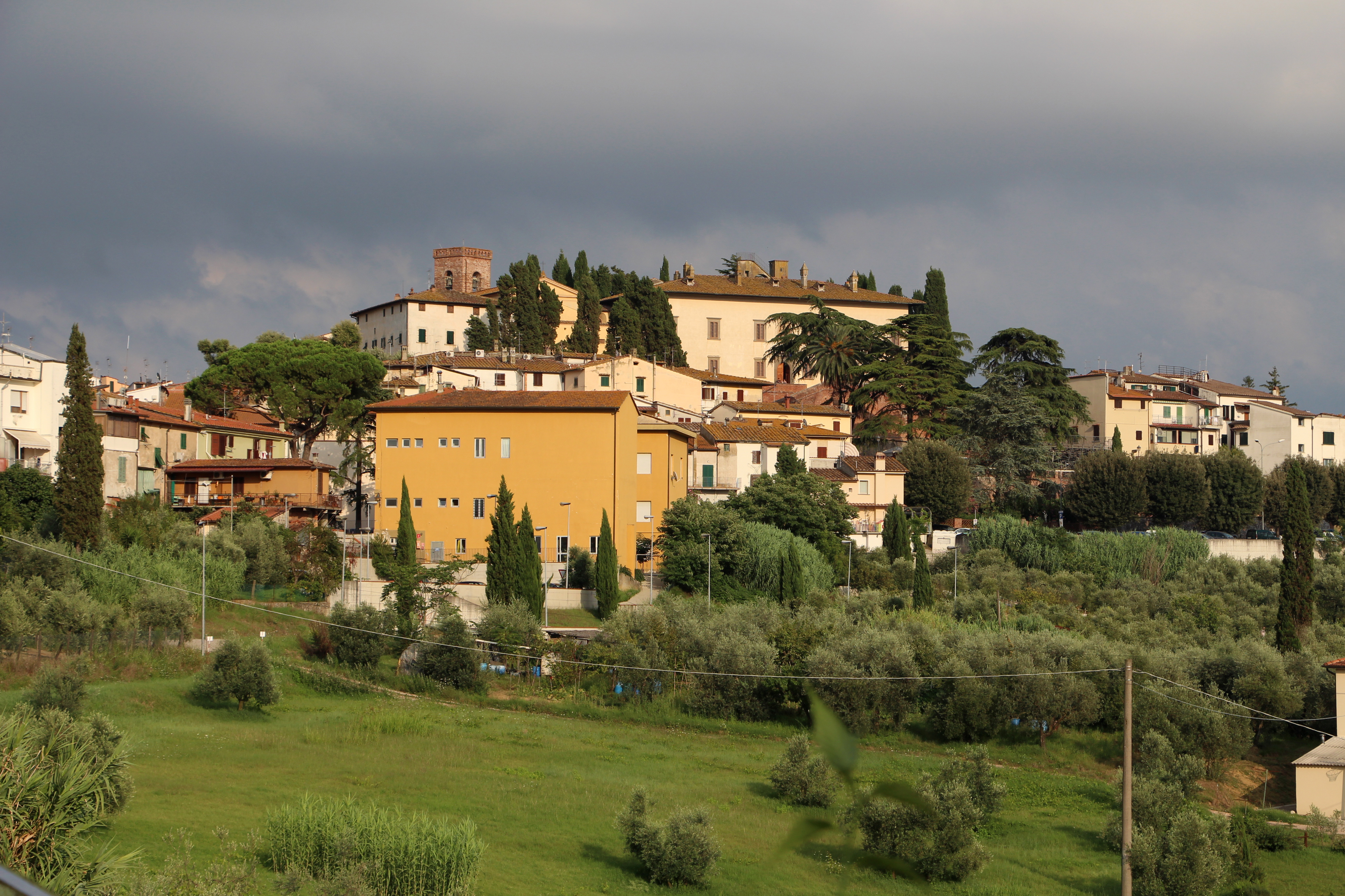 Villa medicea di Cerreto Guidi - MIBAC The making of this document was supported by Wikimedia CH. (Submit your project!) For all the files concerned, please see the category Supported by Wikimedia CH. This is a photo of a monument which is part of cultural heritage of Italy.